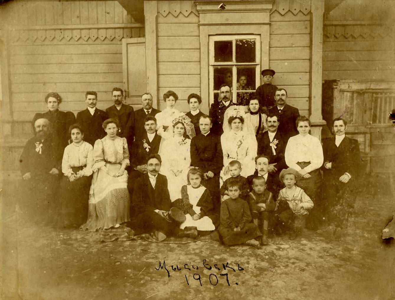 Беларуская (тарашкевіца): Менск (Miensk). Радзіна Бяганскіх ў маёнтку Пагулянцы (Pahulanka) каля Цівалі (Civali))